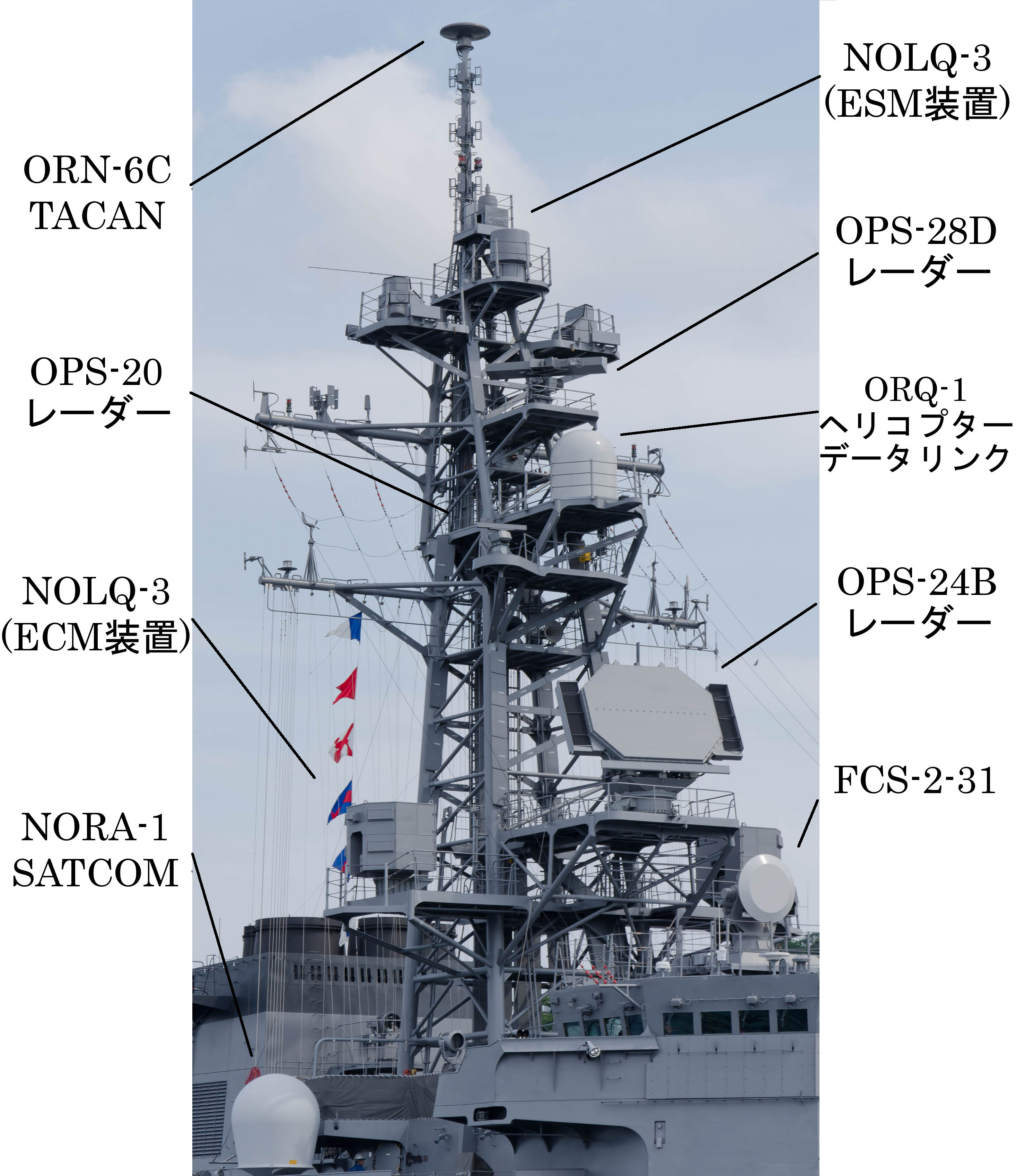 File:Foremast of DD-109.jpgを元に説明を追加したものです。